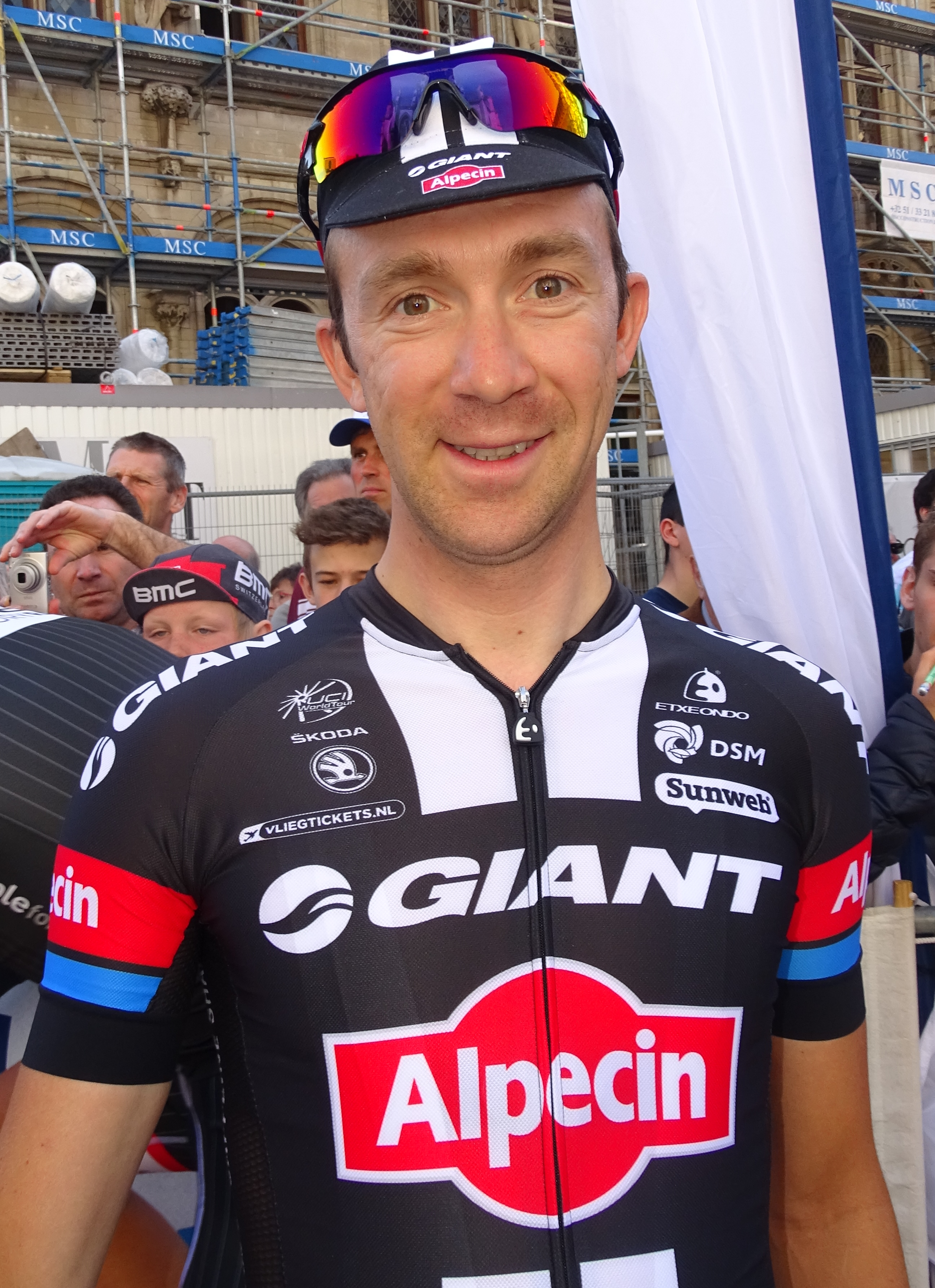 Reportage réalisé le mercredi 15 avril à l'occasion du départ de la Flèche brabançonne 2015 à Louvain, Belgique.